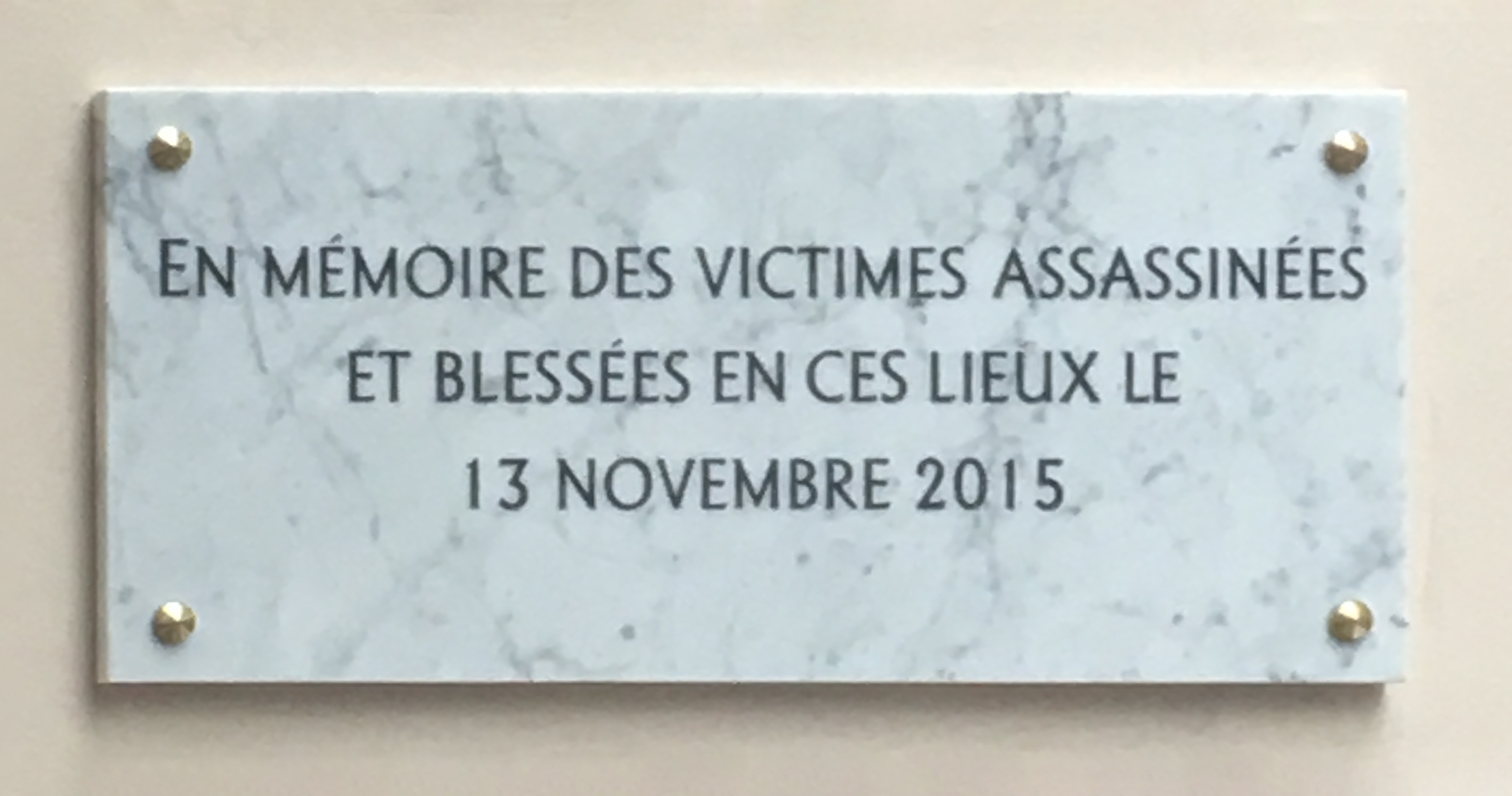 Bataclan, plaque commémorative